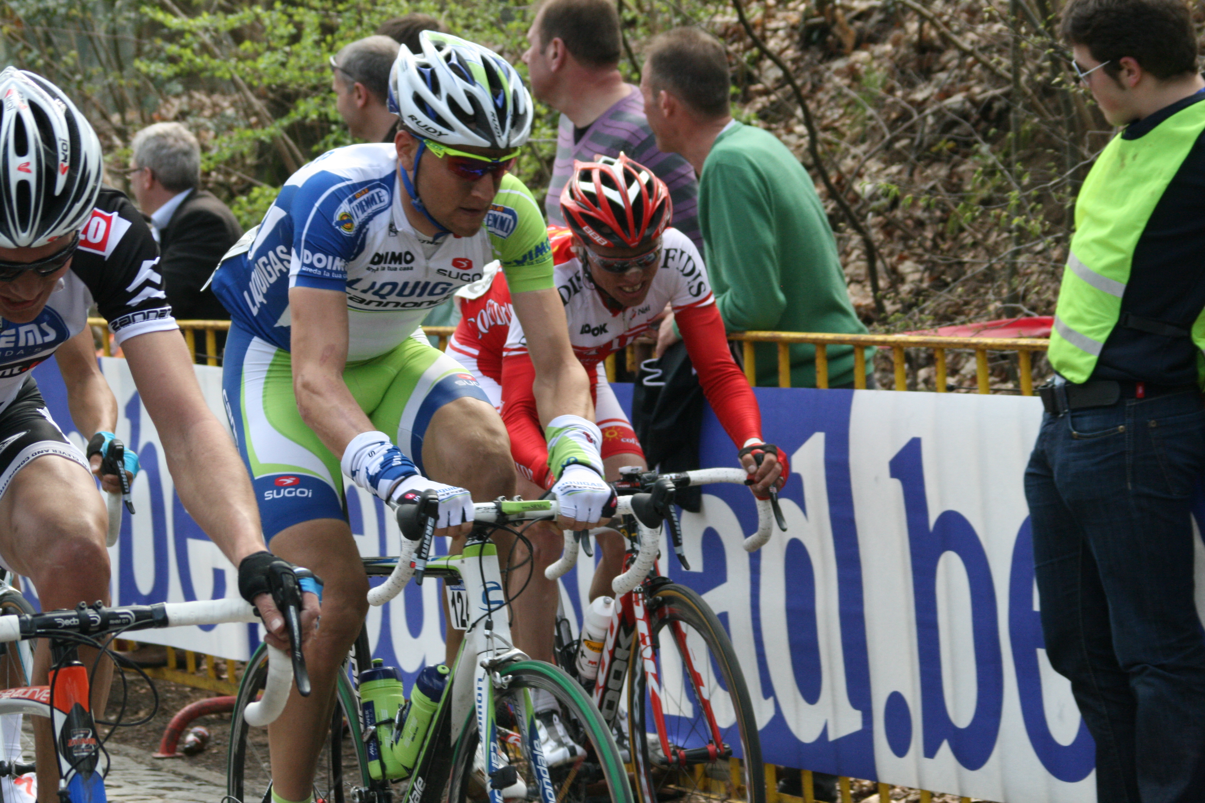 Gent-Wevelgem 2011, Kemmelberg